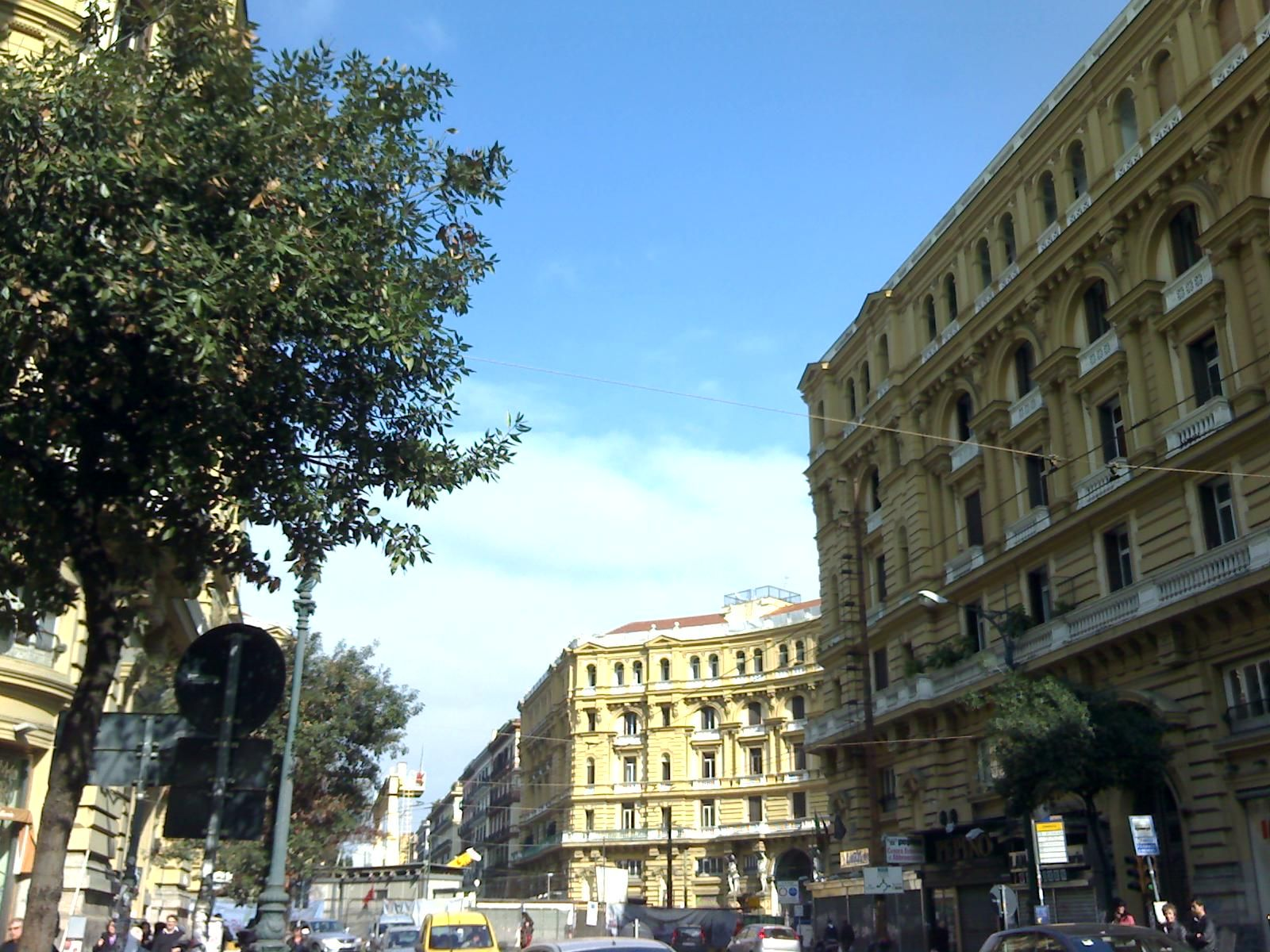 Corso Umberto I (Napoli) In lontananza si vede Piazza Quattro Palazzi (conosciuta anche col nome ufficiale di Piazza Nicola Amore)